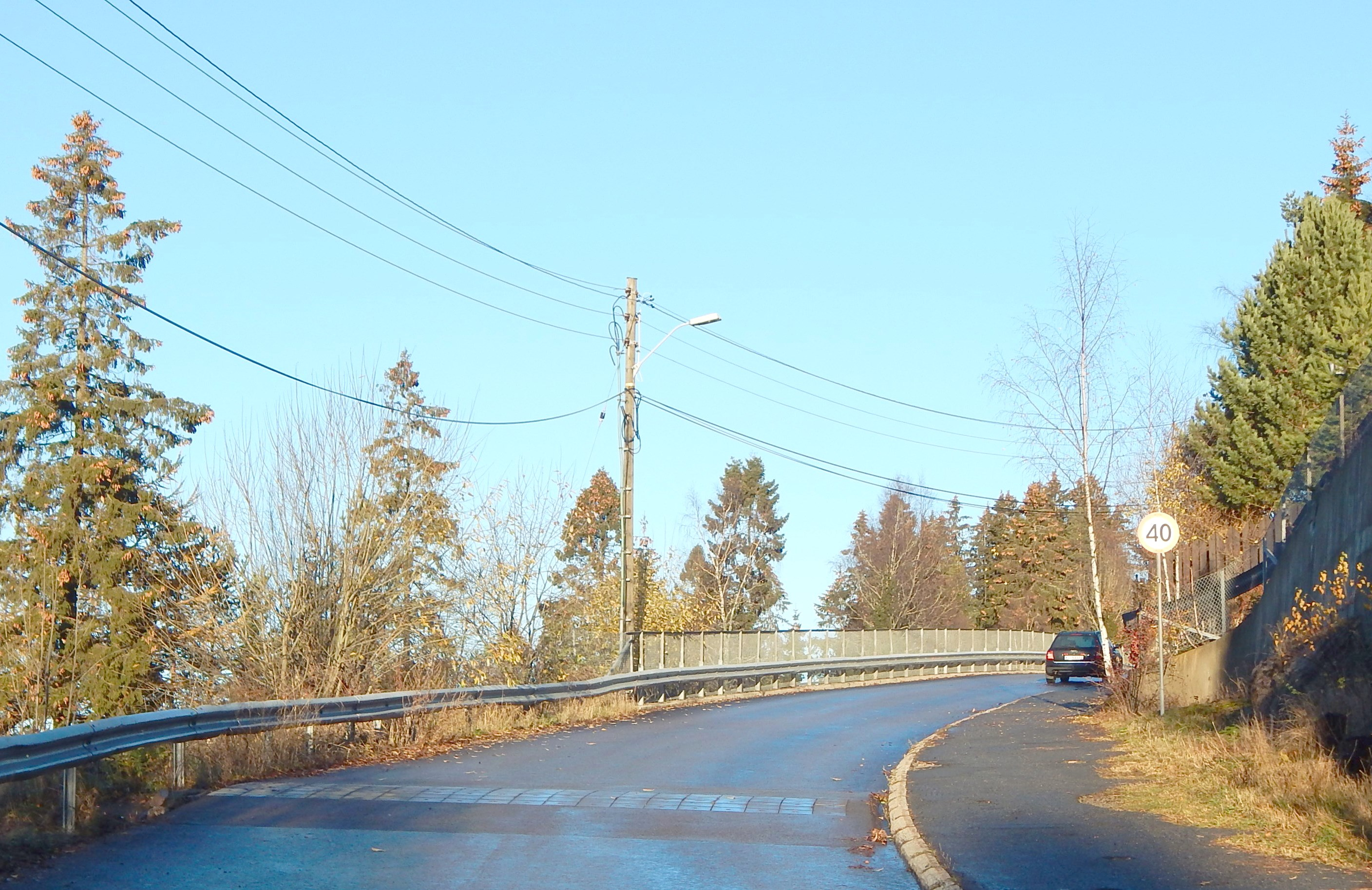 Lillevannsveien